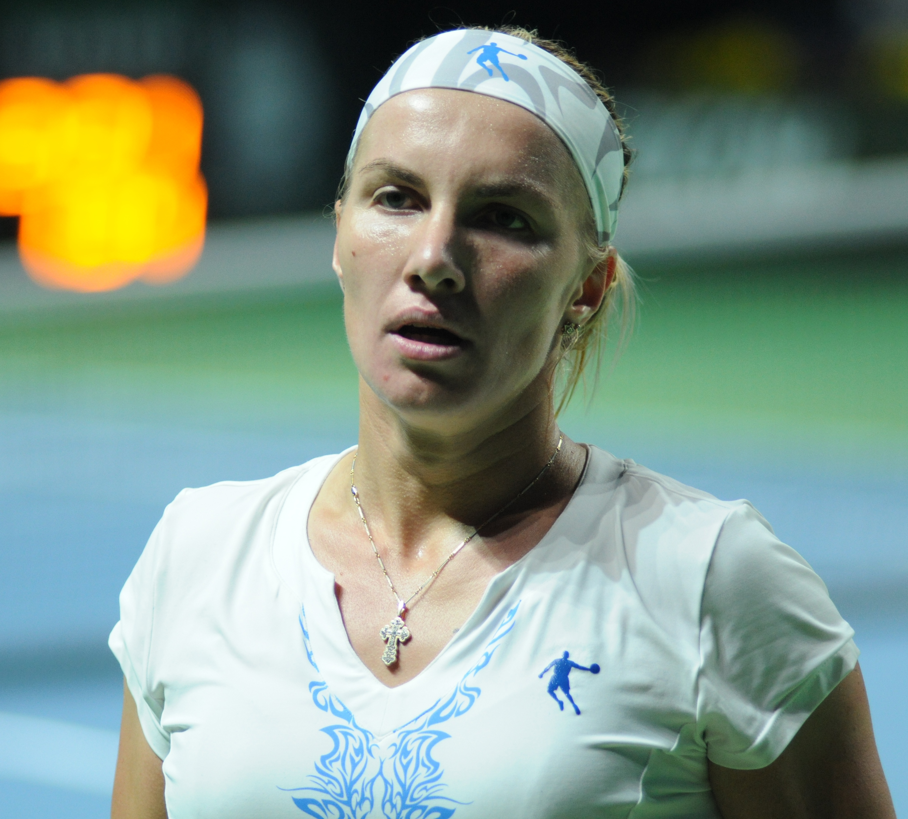 Svetlana Kuznetsova at the 2014 Kremlin Cup